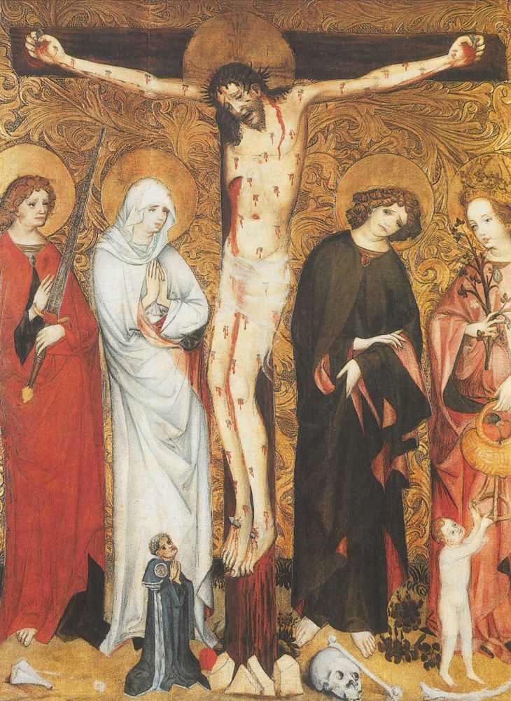 Tafelbild von Nikolaus Eisenberg (nach 1460): Kreuzigung mit Maria, Johannes d.E., Andreas und Barbara